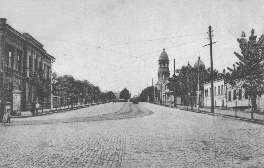 Нахичевань-на-Дону. Площадь Толстого. На заднем плане церковь Александра Невского